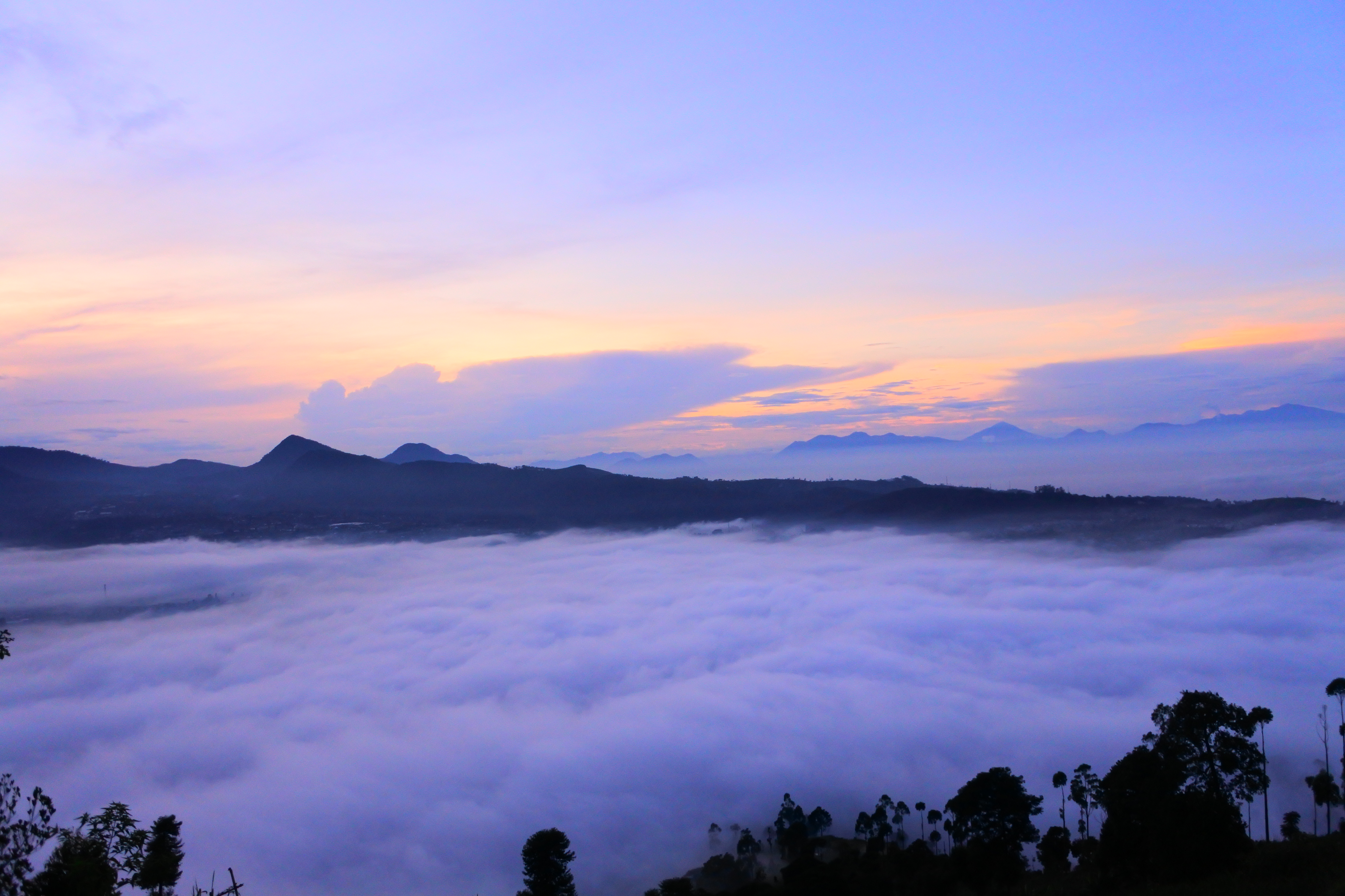 Gunung Putri Lembang Jawa Barat